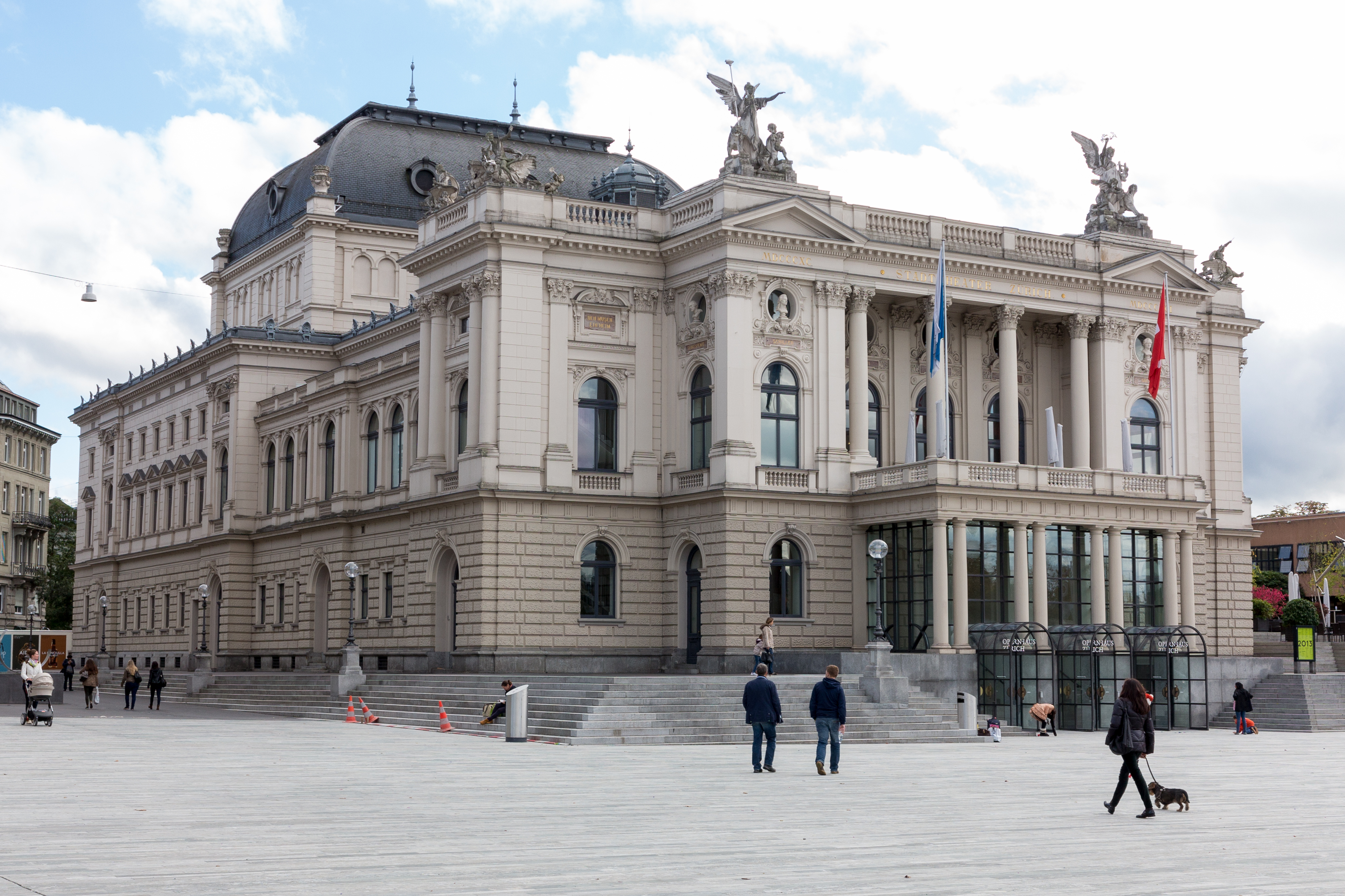 Opernhaus Zürich (Okt. 2013)